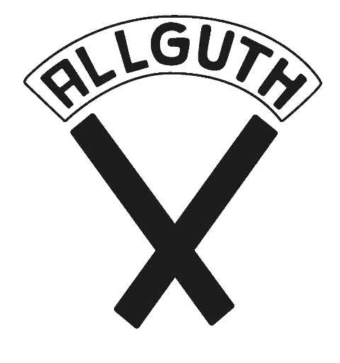 Allguth Logo aus dem Jahr 1958